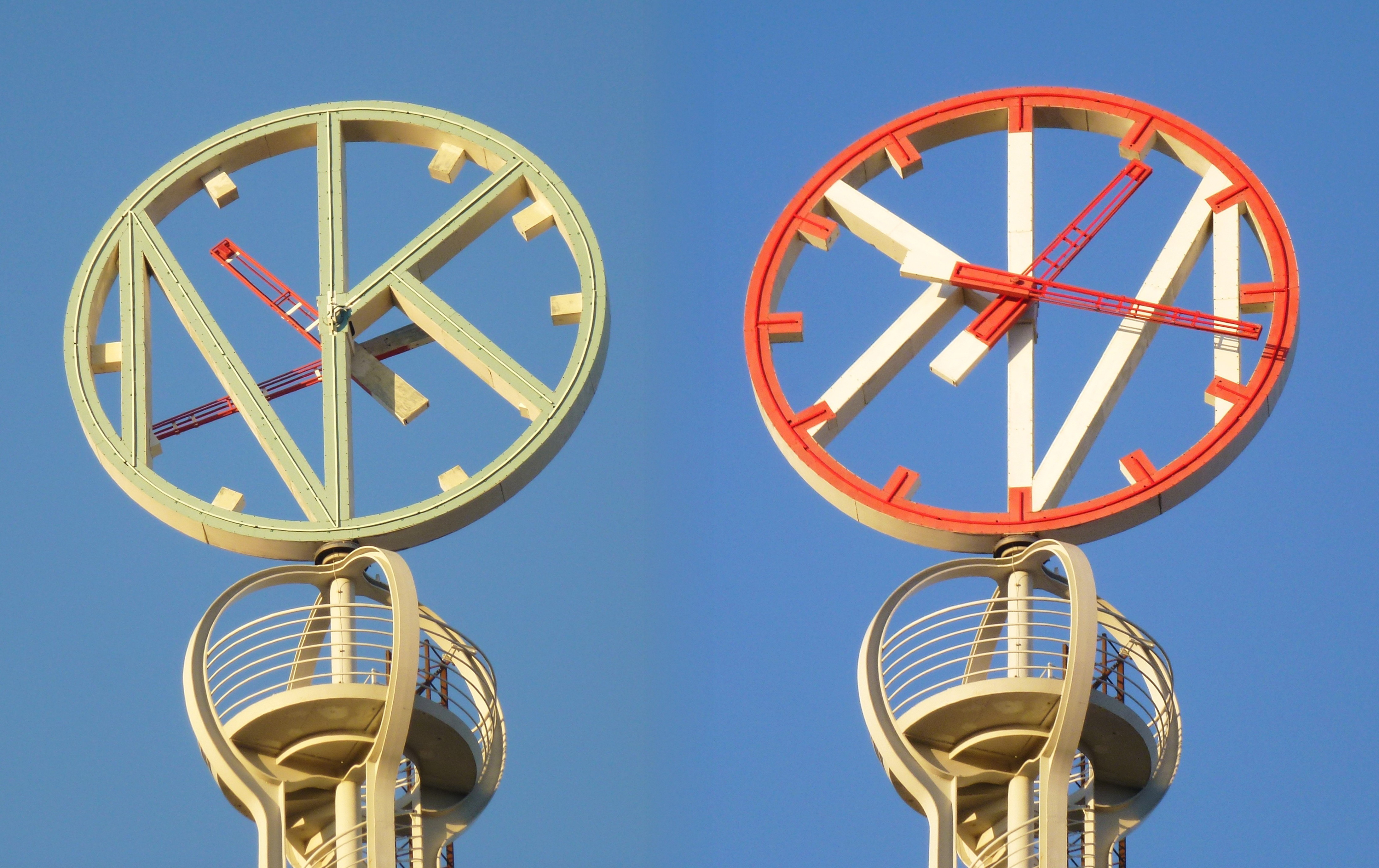 NK-klockan (montage)